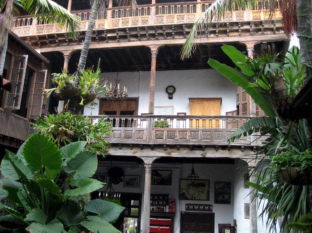 Patio interior con flores y balcón de madera en la Orotava.Tenerife